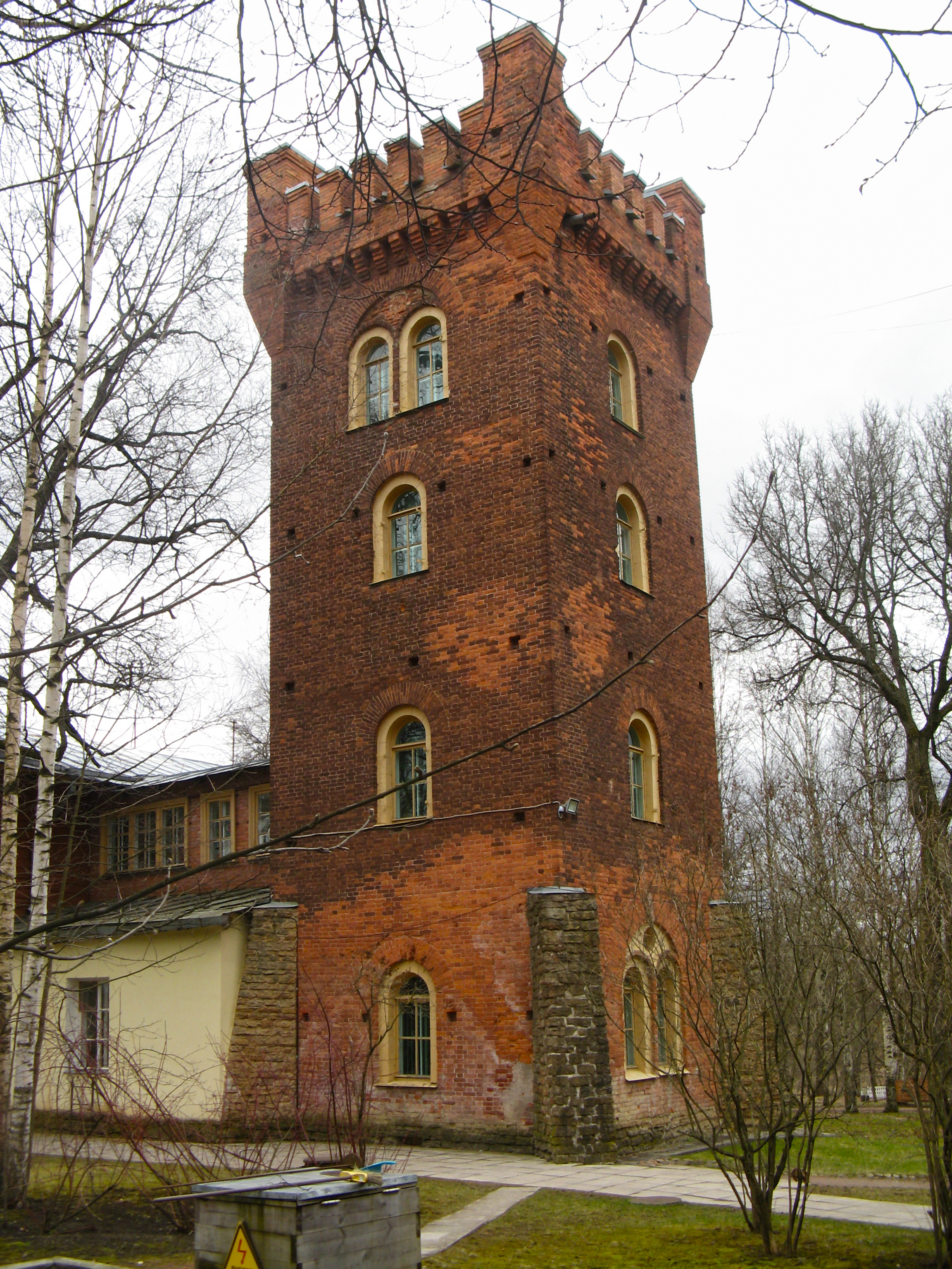 Дача А.П. Брюллова: Елизаветинская улица, 2, Павловск, Пушкинский район, Санкт-Петербург